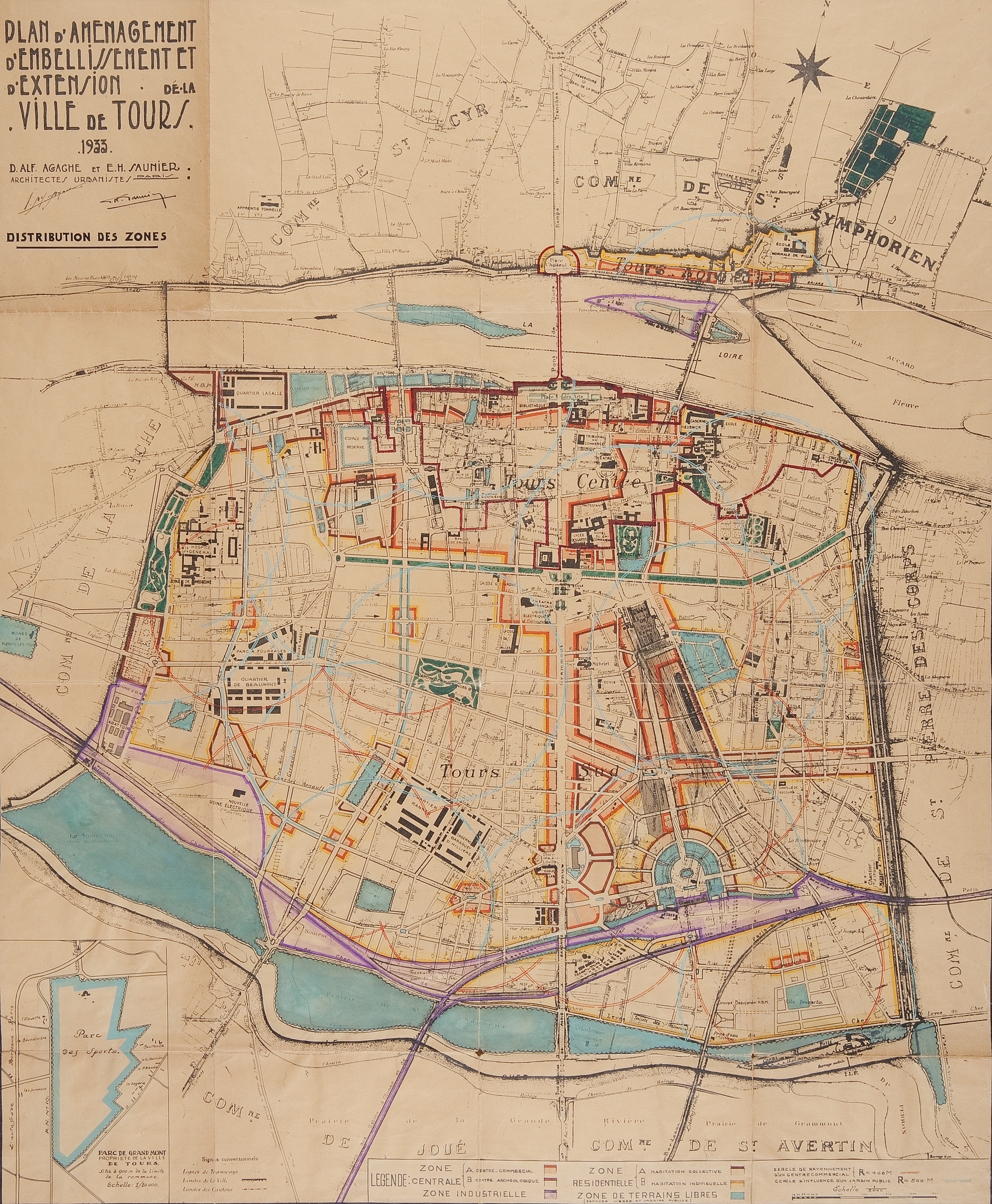 Ville de tours, projet PAEE 1933, auteur AGACHE et SAUNIER architectes urbanistes